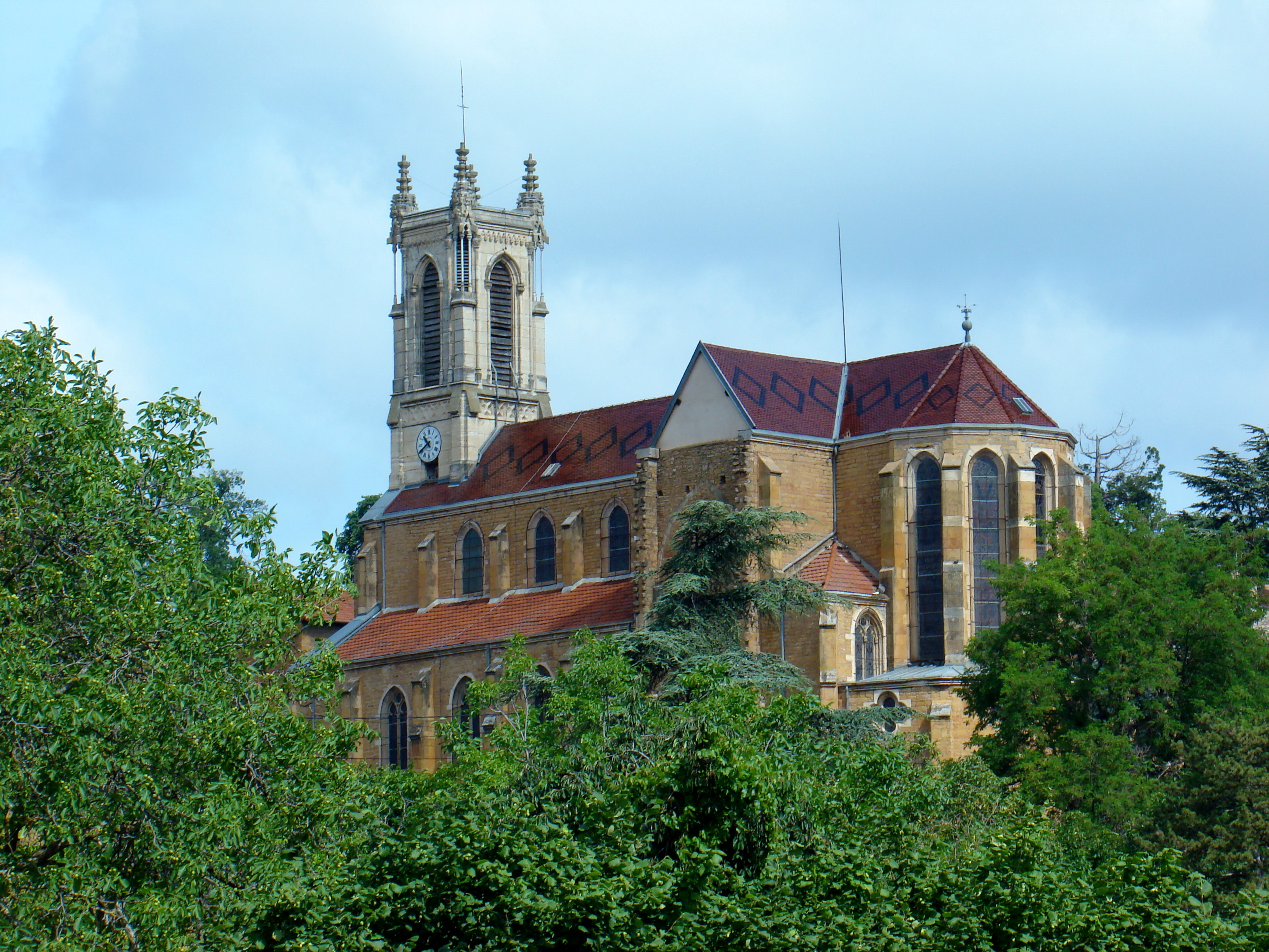 Eglise de Cogny vue de la campagne.